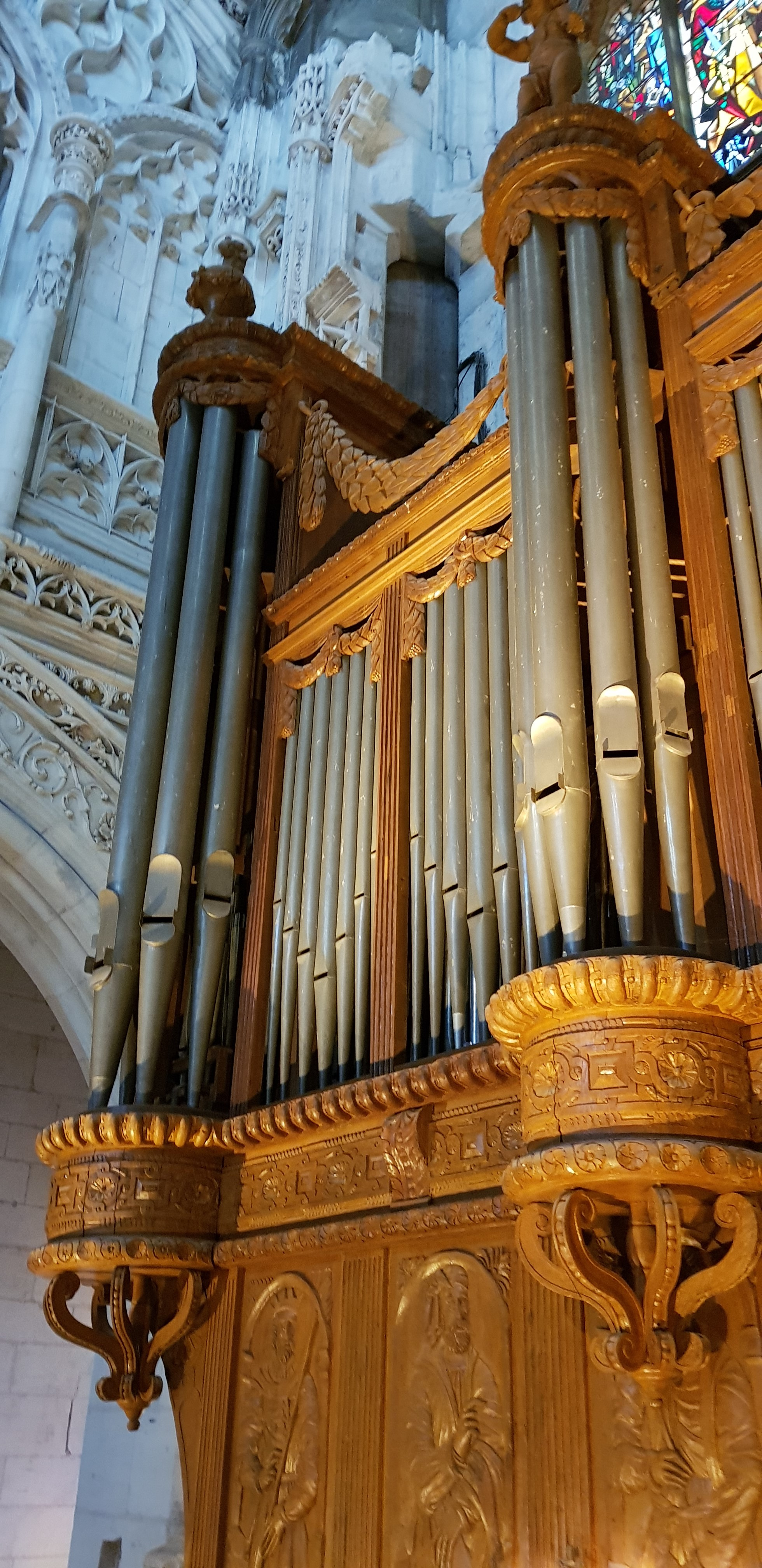 L'orgue de l'église Saint-Ouen de Pont-Audemer vue de la tribune (détail)